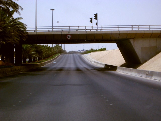 Riyadh, Saudi Arabia